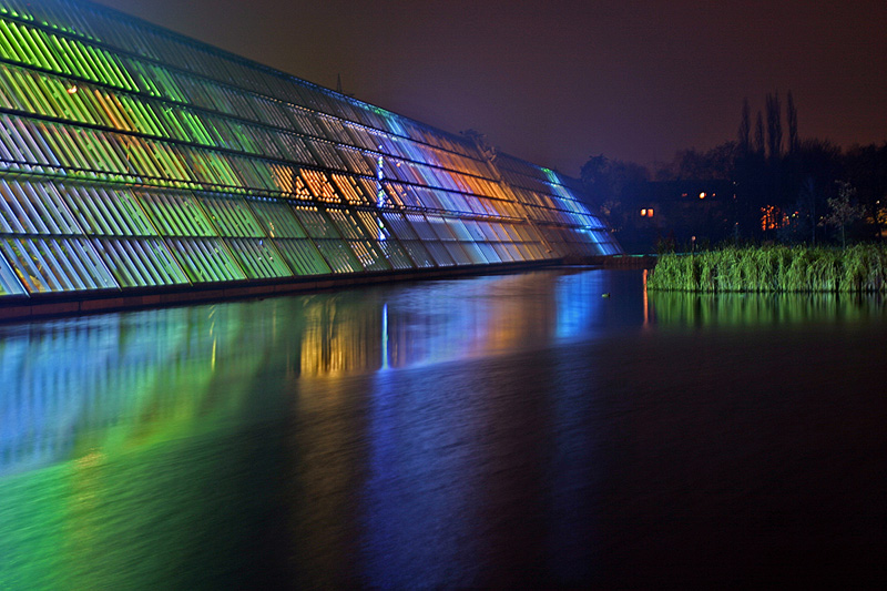 Gebäude des Wissenschaftsparks Rheinelbe in Gelsenkirchen mit Lichtkunst von Dan Flavin